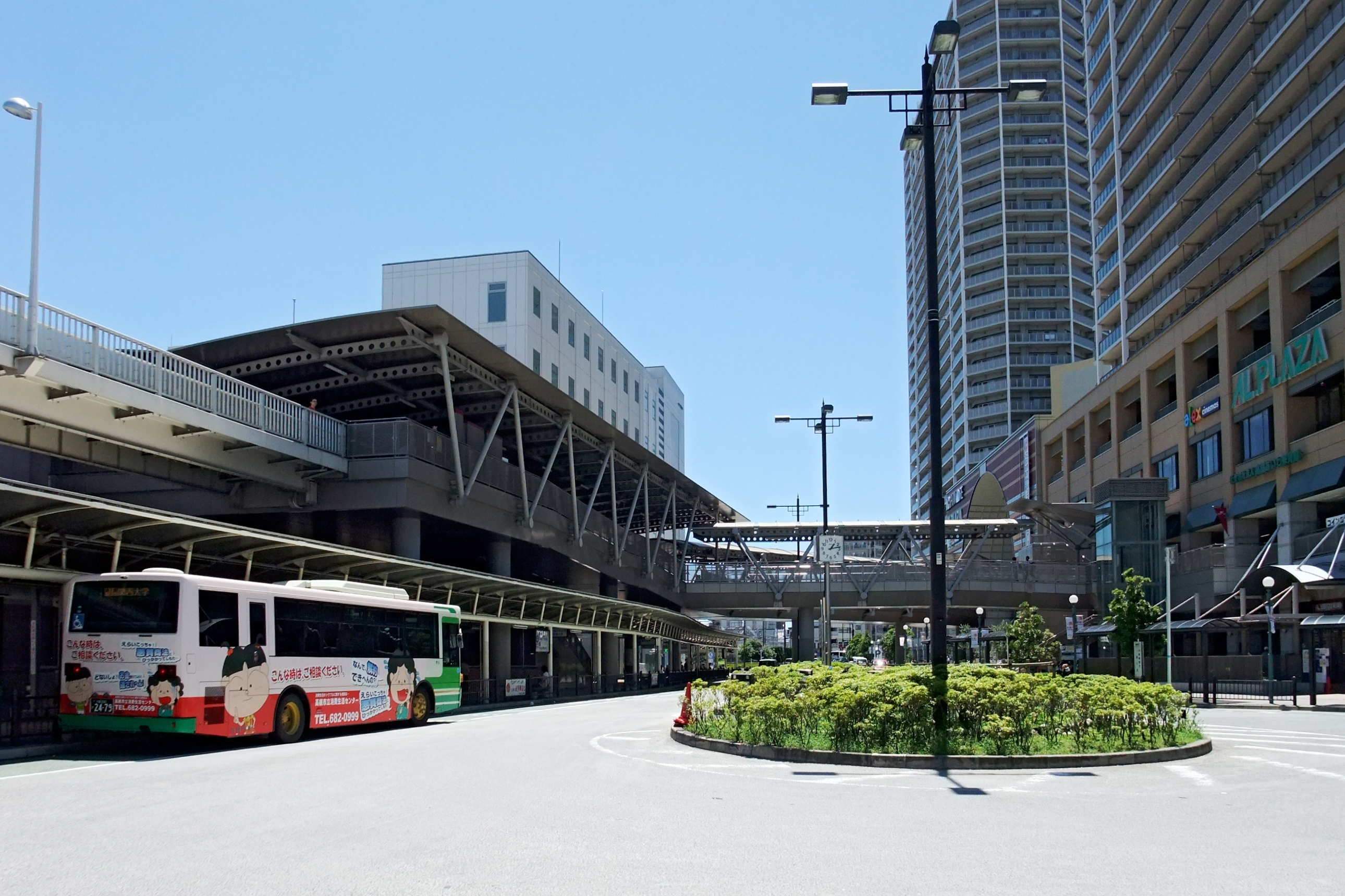 Takatsuki Station in Takatsuki, Osaka prefecture, Japan